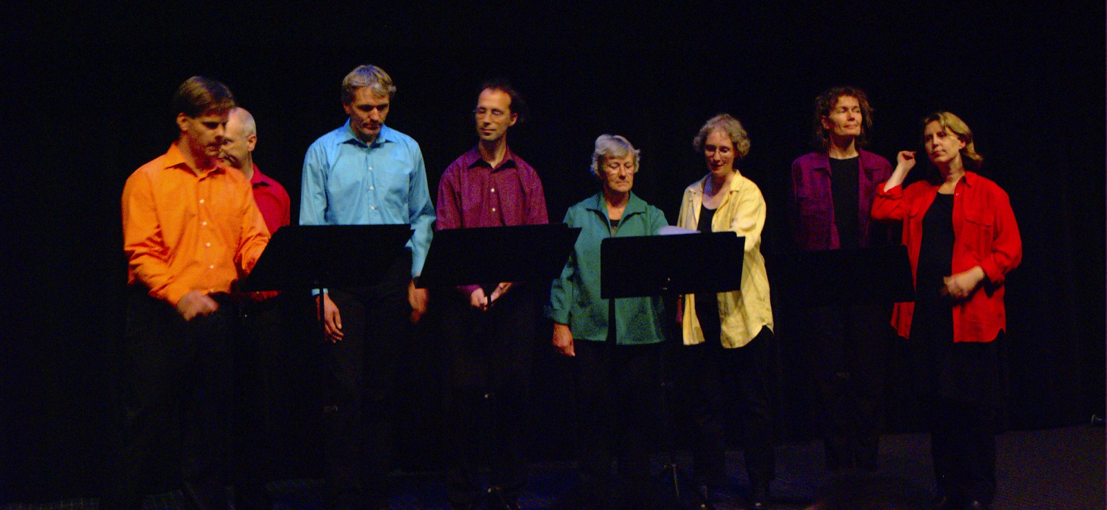 Akordo en koncerto dum UK 2008 en Roterdamo